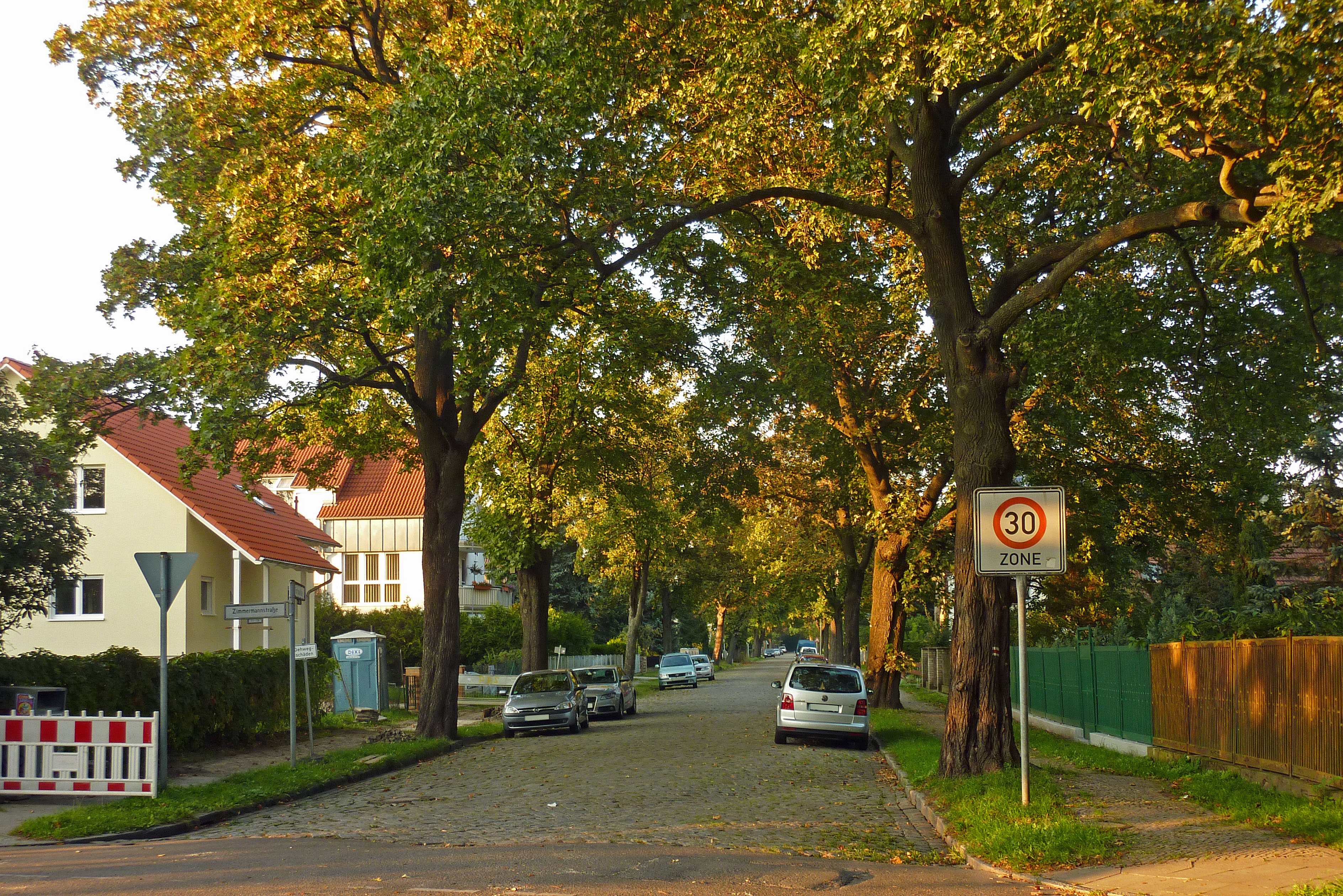 Fortunaallee in Berlin-Biesdorf